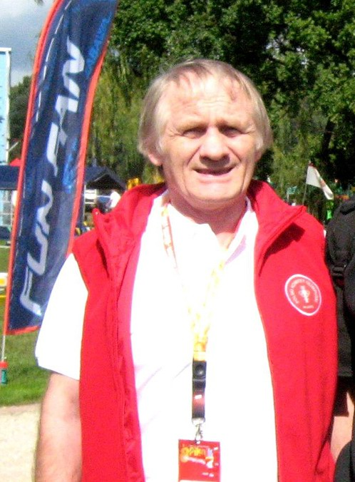 Józef Lipień (ur. 6 lutego 1949), polski zapaśnik